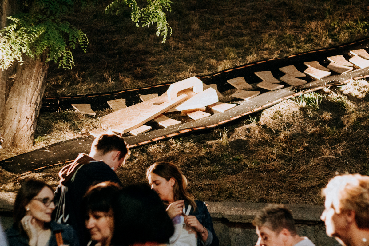 Noc Kultury fot. Natalia Ogłoszka